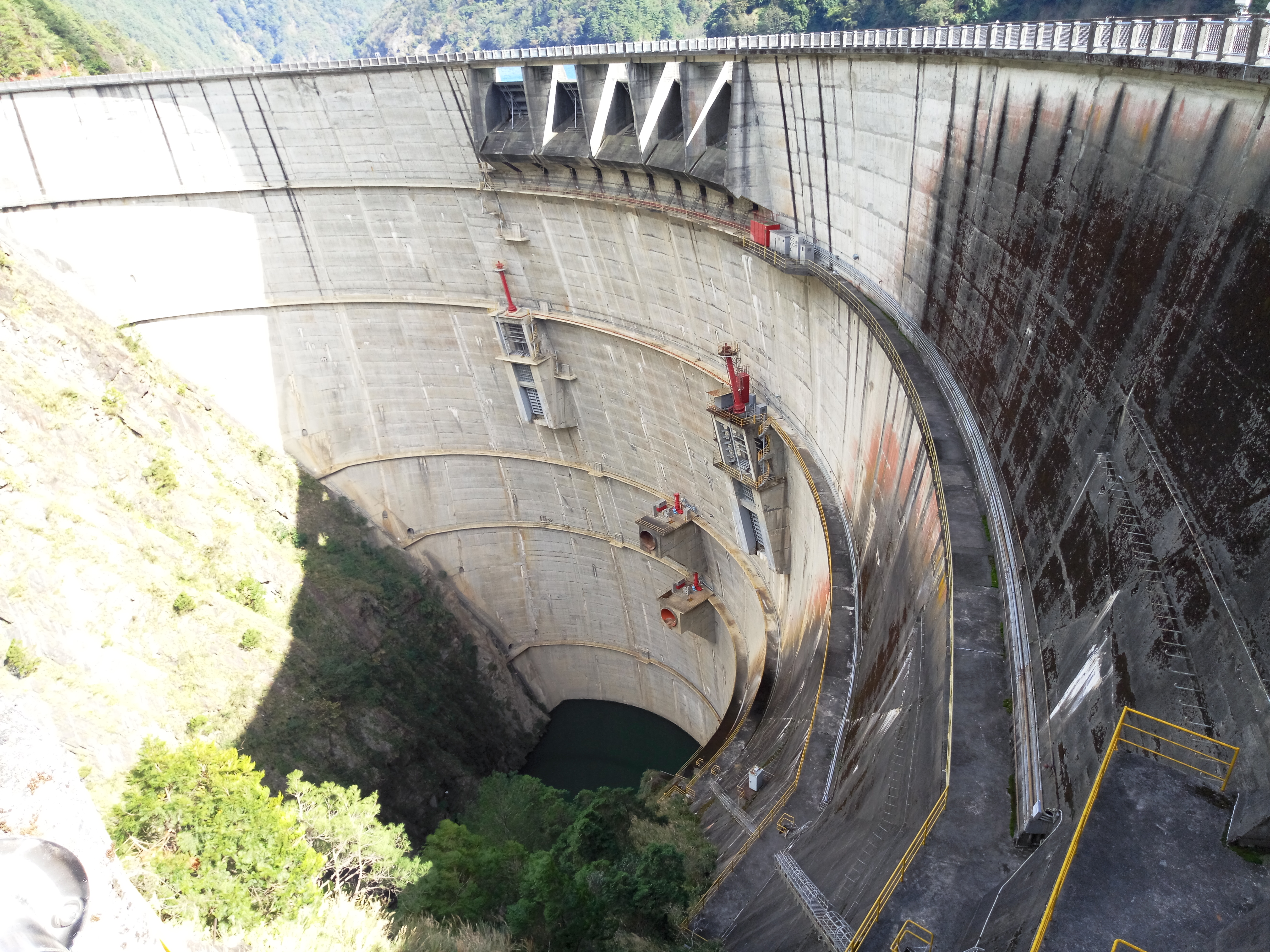 德基水庫大壩。